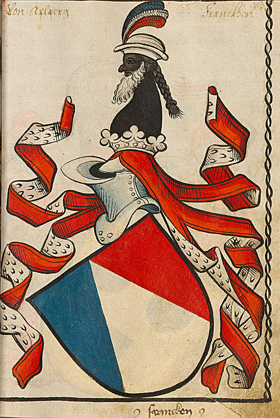 Scheibler'sches Wappenbuch , älterer Teil; Seite 93 Von Äplperg Franckhen